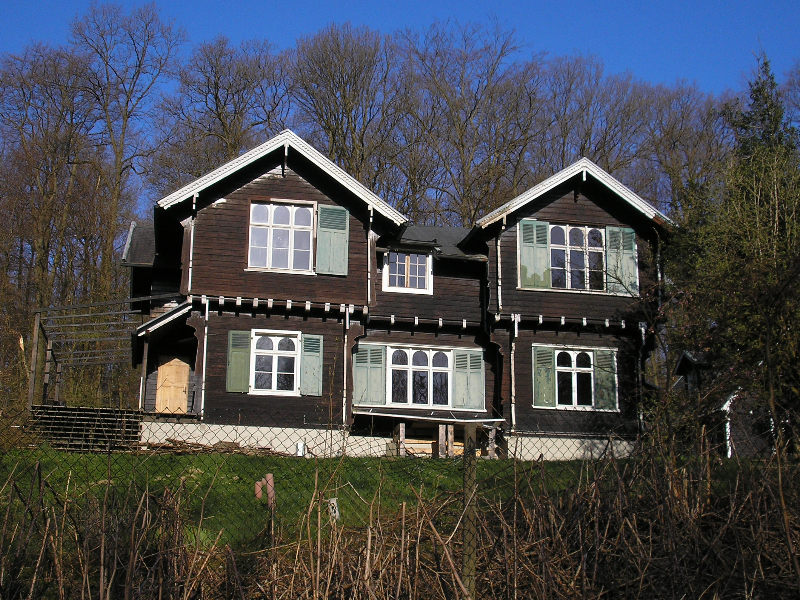 Forsthaus bei Rieferath, 1893 auf der Weltausstellung in Chicago gezeigt